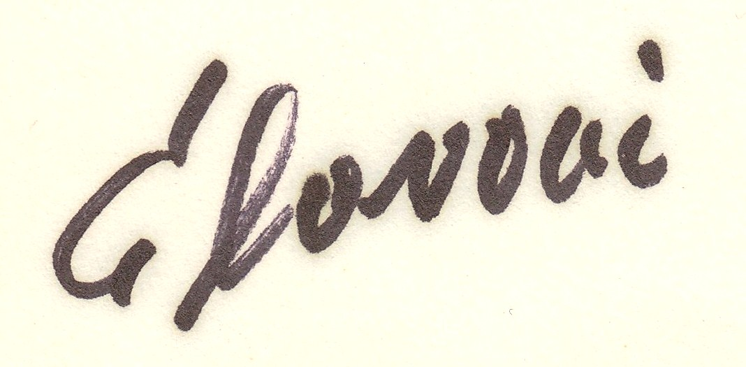 Autogramm des ehem. Bundesliga-Spielers Ahmet Glavović von 1977